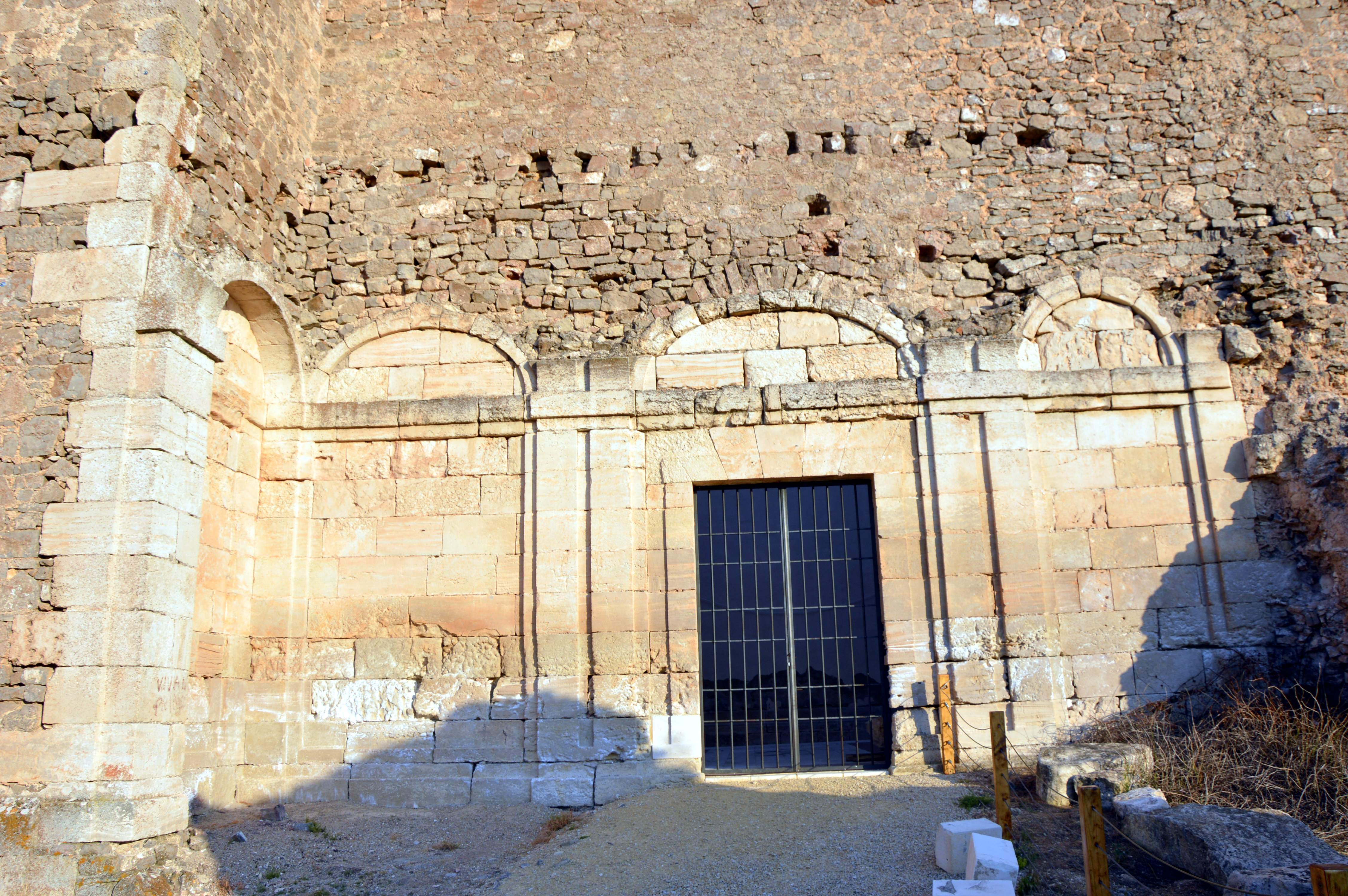 Detalle de la fachada principal del convento de las Concepcionistas -monjas de clausura de la Concepción Franciscana de Moya (Cuenca)-, siglo XVII (2017).